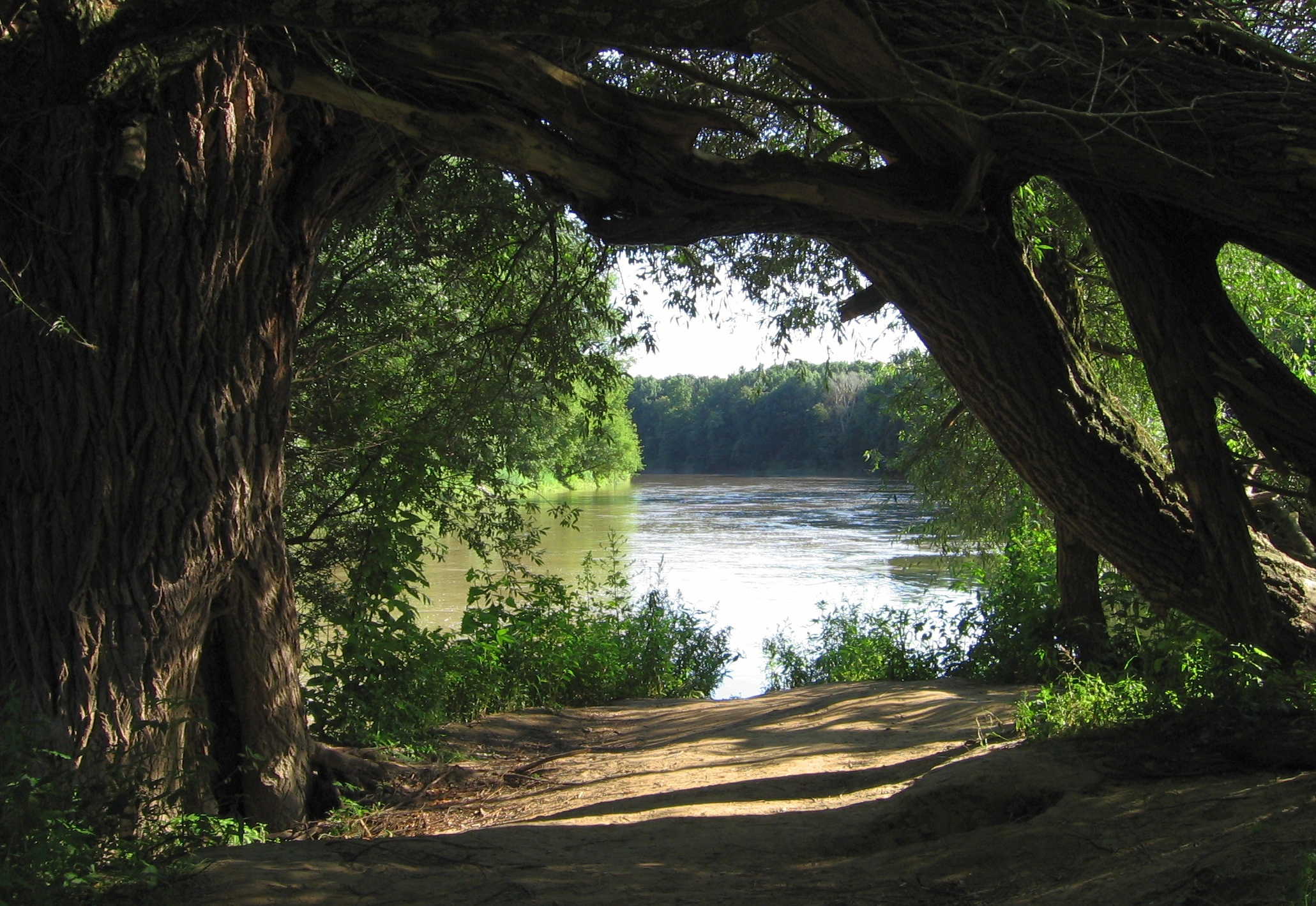 Soutok Moravy a Dyje - pohled na výběžek českého břehu.